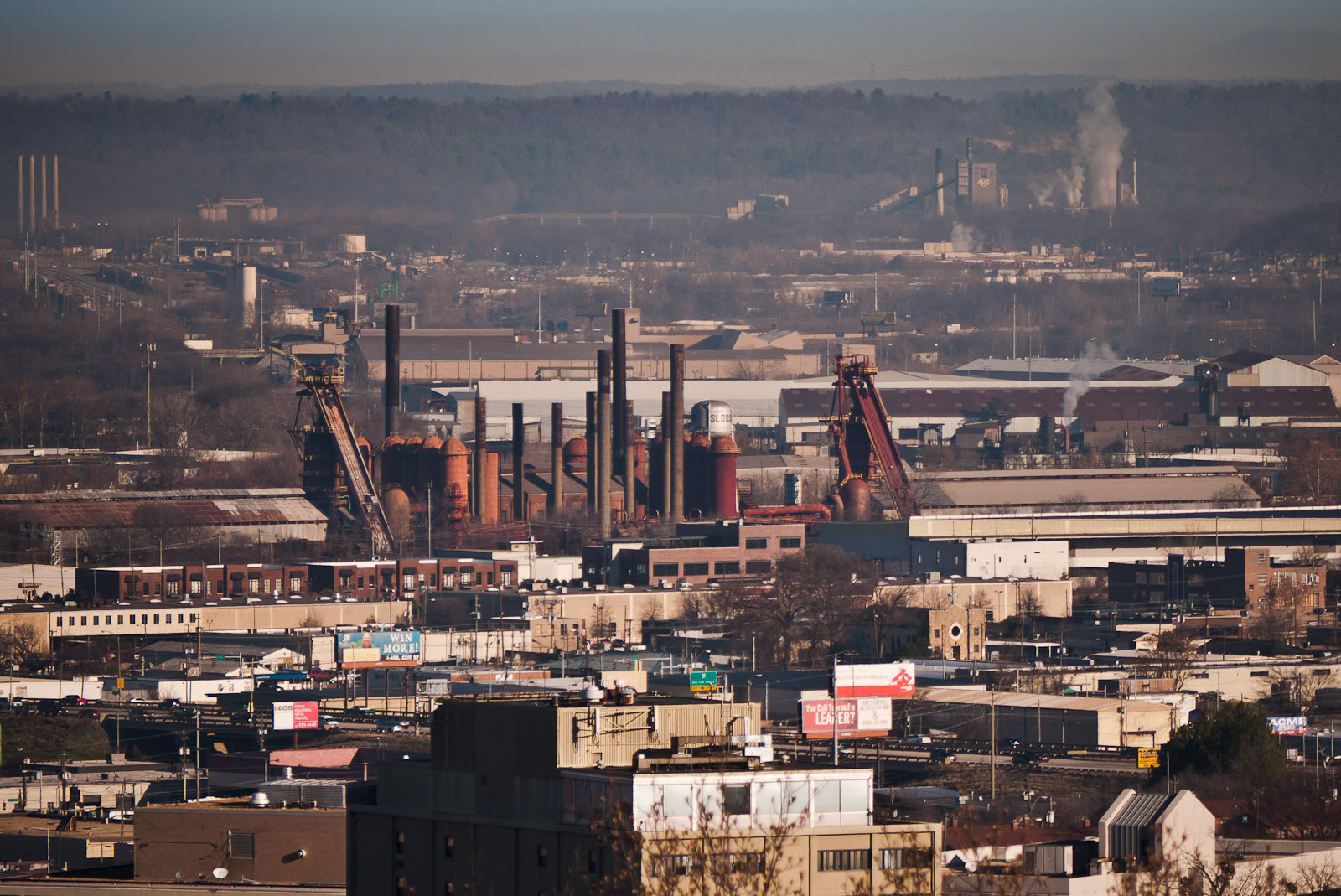 From Vulcan Park, Birmingham AL